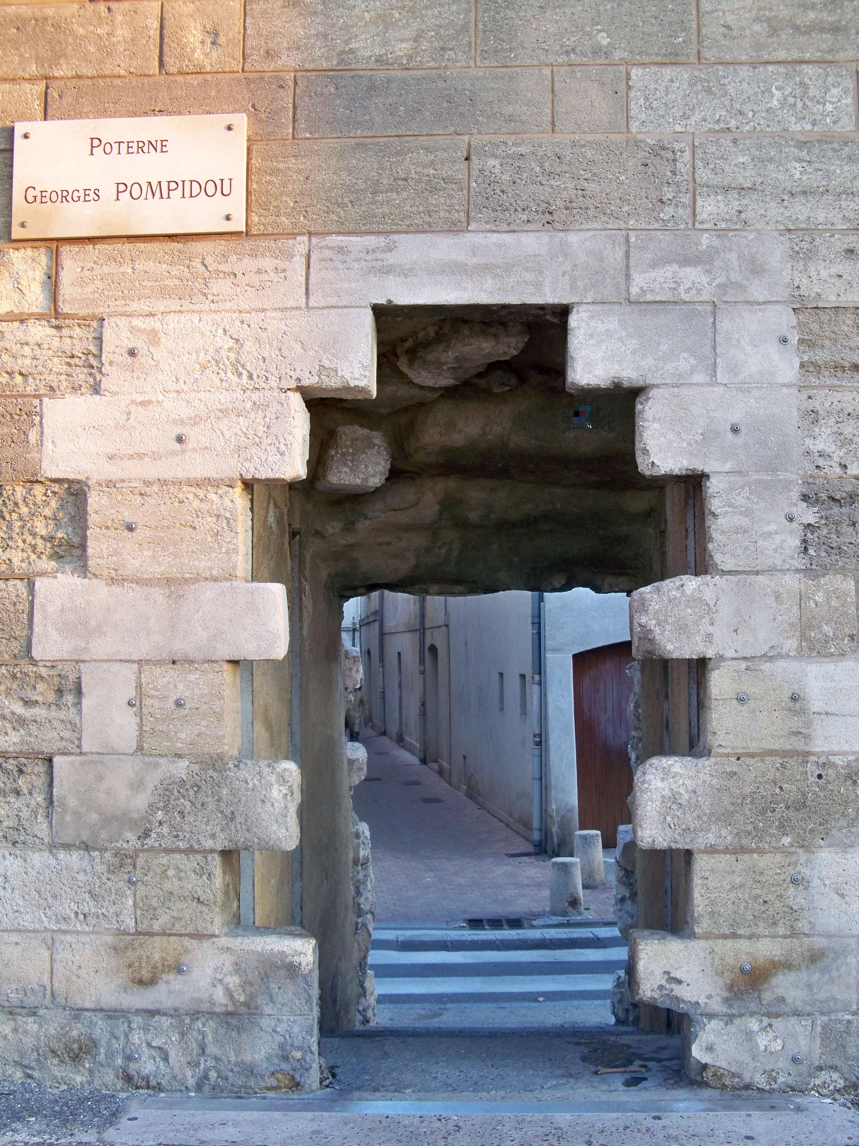 poterne Georges Pompidou des remparts d'Avignon, Vaucluse, France